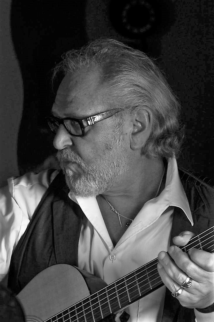 Portrait Sandy Wolfrum